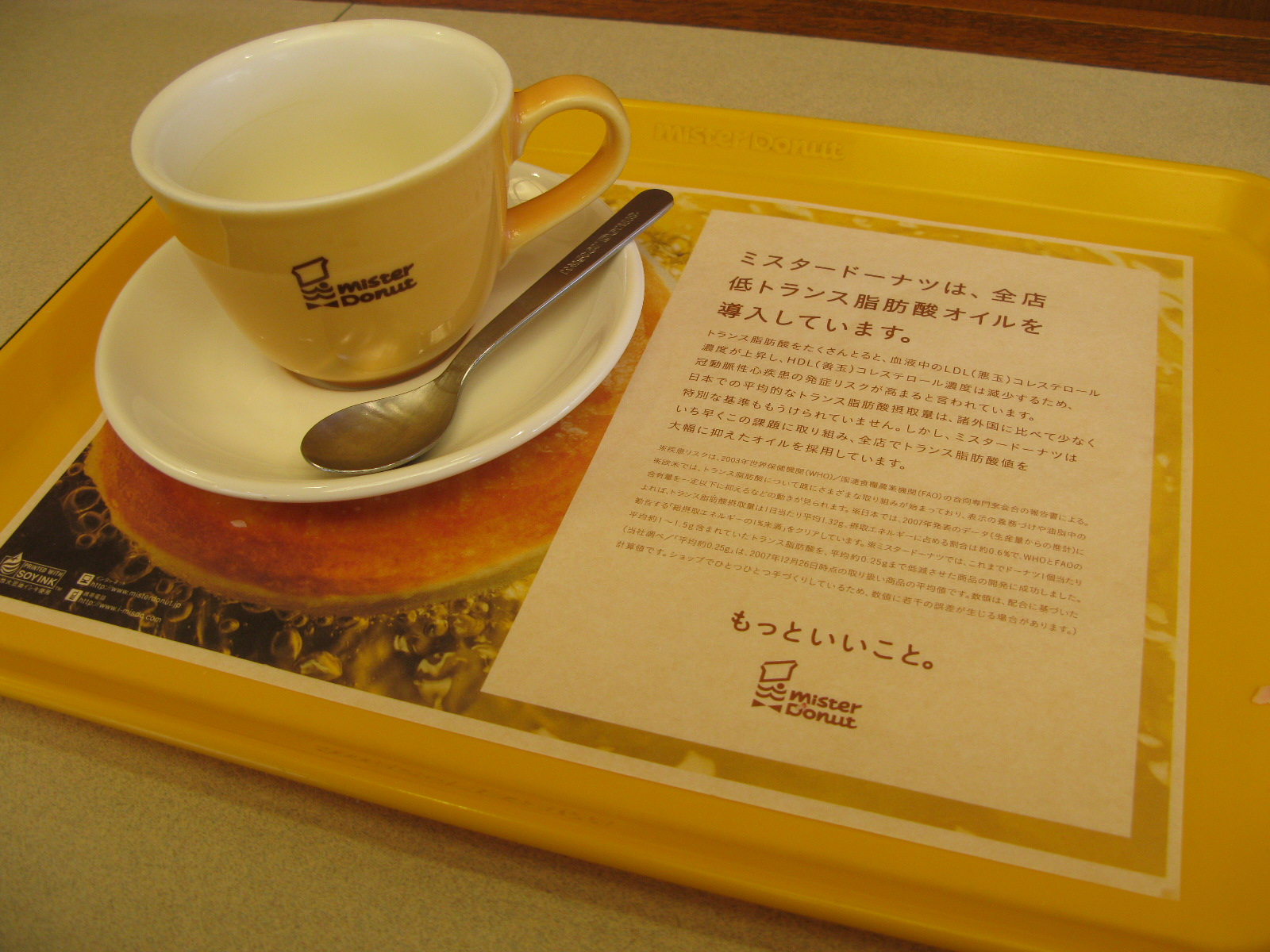 ミスタードーナツのコーヒーとトレイ